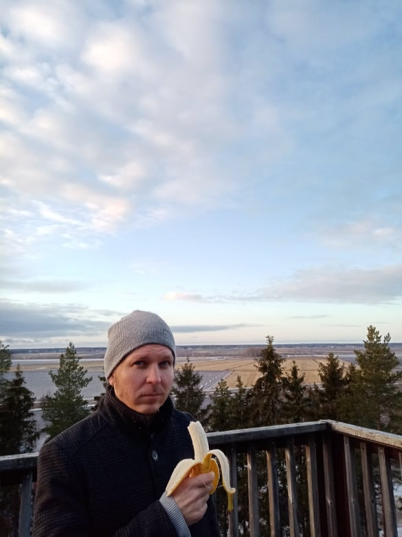 Mikko Väänänen syömässä banaania Kauhavalla 2019